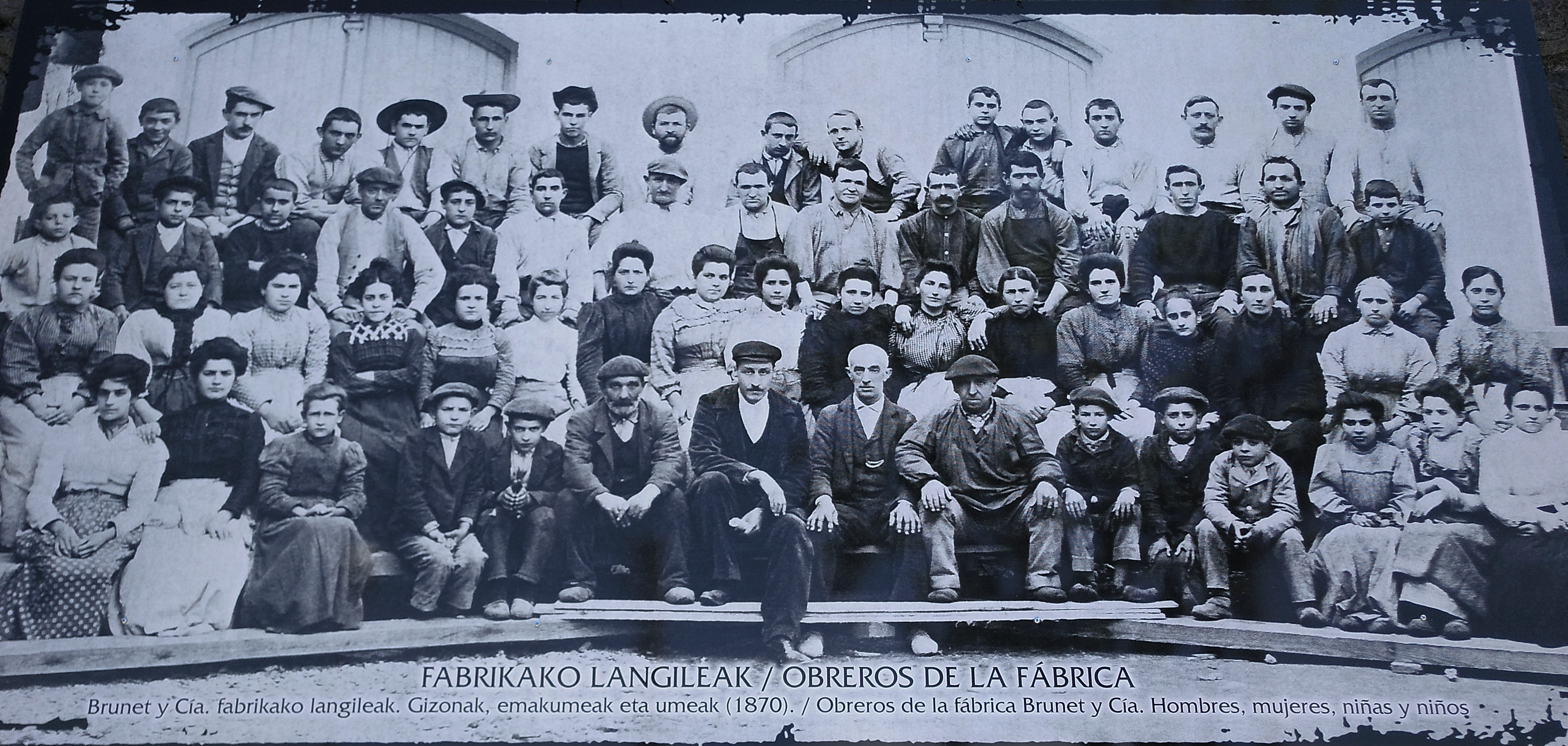 FABRIKAKO LANGILEAK. Brunet y Cía fabrikako langileak. Gizonak, emakumeak eta umeak (1870)